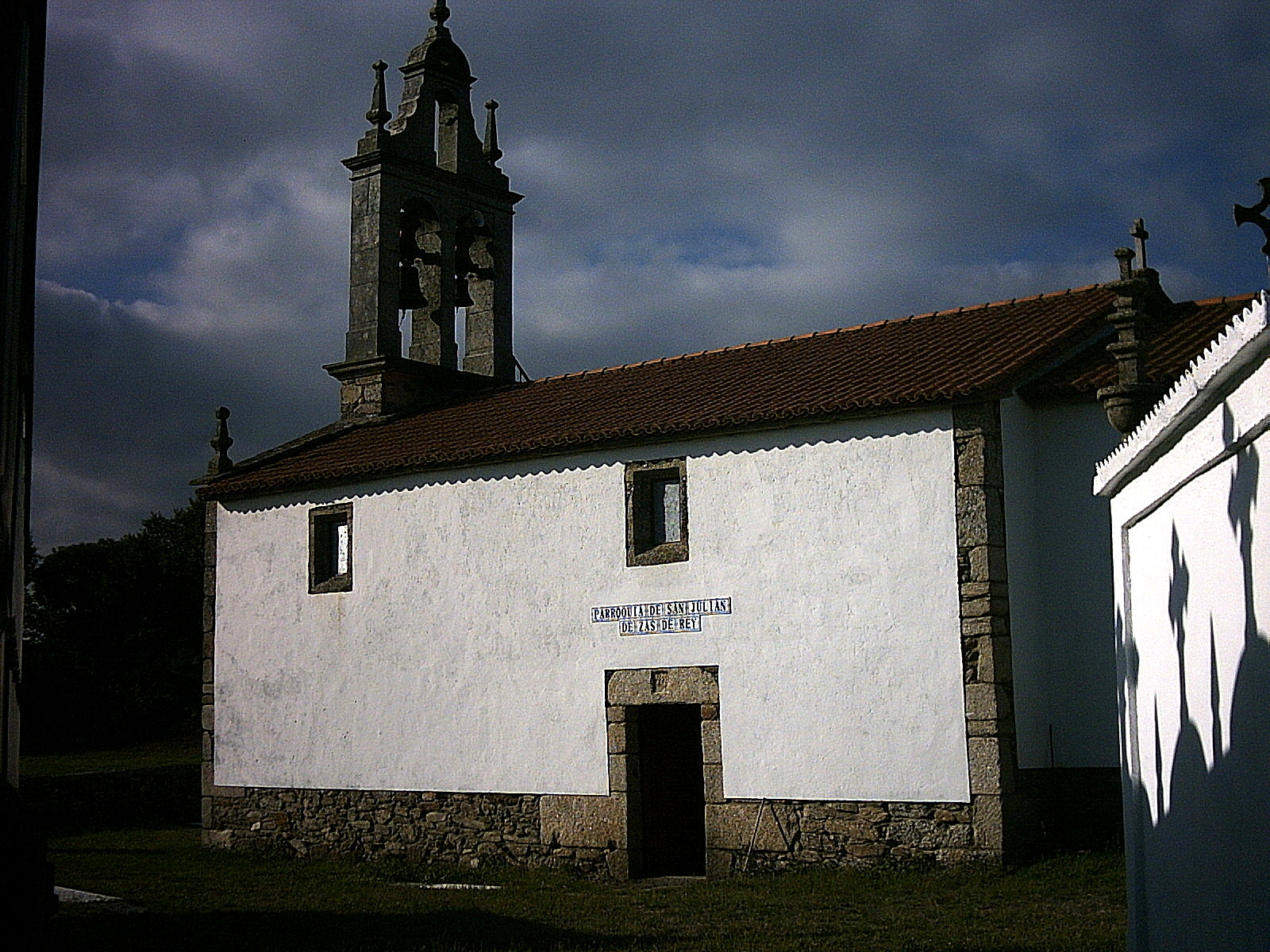 Igrexa de Zas de Rei, Melide.